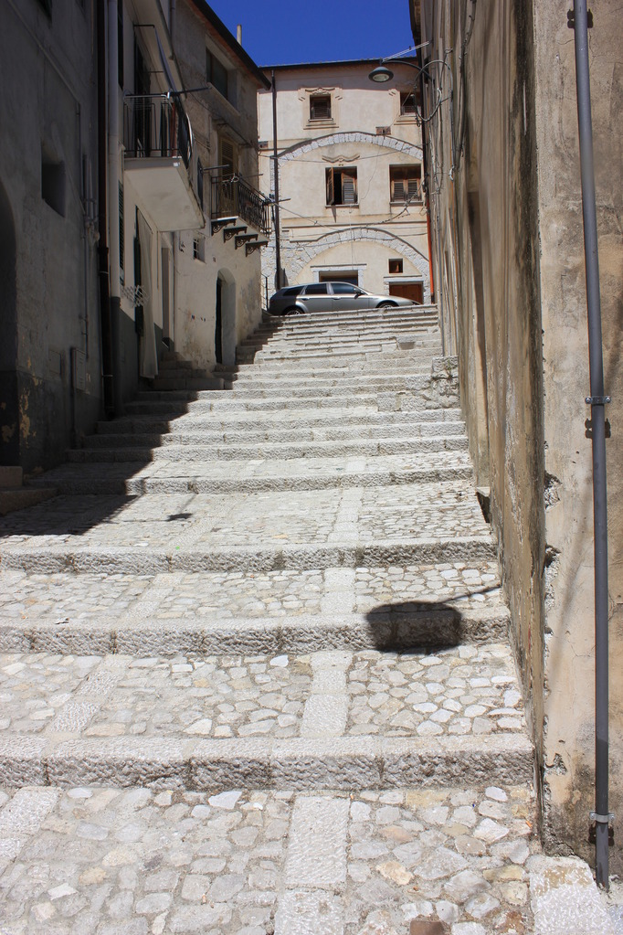 Via Gipsari, Piana degli Albanesi (PA). Qui si è mantenuta la strada tipica a scalinata e pietre locali, che caratterizzavano il centro storico prima del boom economico italiano post guerra che stravolse o sfigurò l'aspetto urbano. Infondo è visibile il Palazzo Manzone (Pallaci Mancuni).